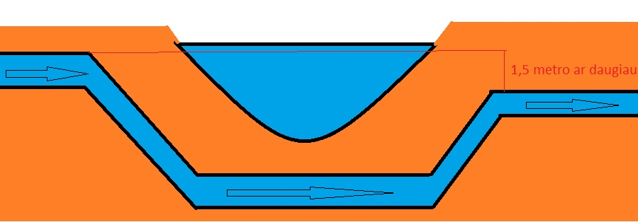 Diukerio schema, veikimo principas